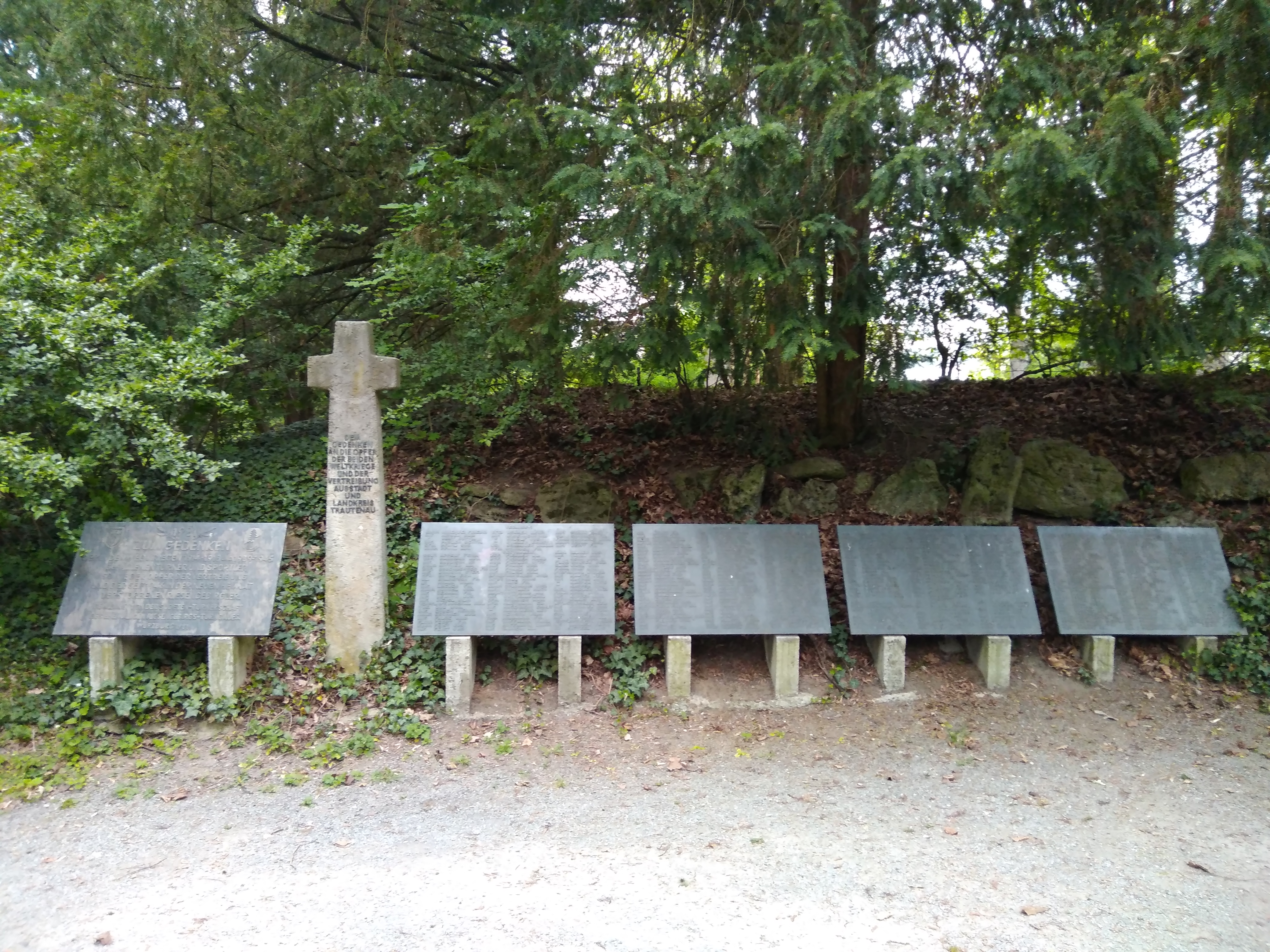 Auf dem Gedenkkreuz steht geschrieben: "Dem Gedenken an die Opfer der beiden Weltkriege und der Vertreibung aus Stadt und Landkreis Trautenau". Würzburg ist seit 1956 die Partnerstadt von Trautenau, einer Stadt aus Tschechien, original geschrieben "Trutnov". Auf der Tafel links neben dem Kreuz steht: "1981 Zum Gedenken der in den Weltkriegen 1914-1948 und 1939-1945 gefallenen Turner und Sportler sowie Opfer der Vertreibung und der seit 1946 in der neuen Heimat verstorbenen Riesengebirgler. Gewidmet von der Sudeten.Turnerschaft des ehemaligen Riesengebirgs-Turngaues. Würzburg 1981" Auf den vier Tafeln rechts neben dem Gedenkkreuz stehen die Namen der verstorbenen geschrieben.